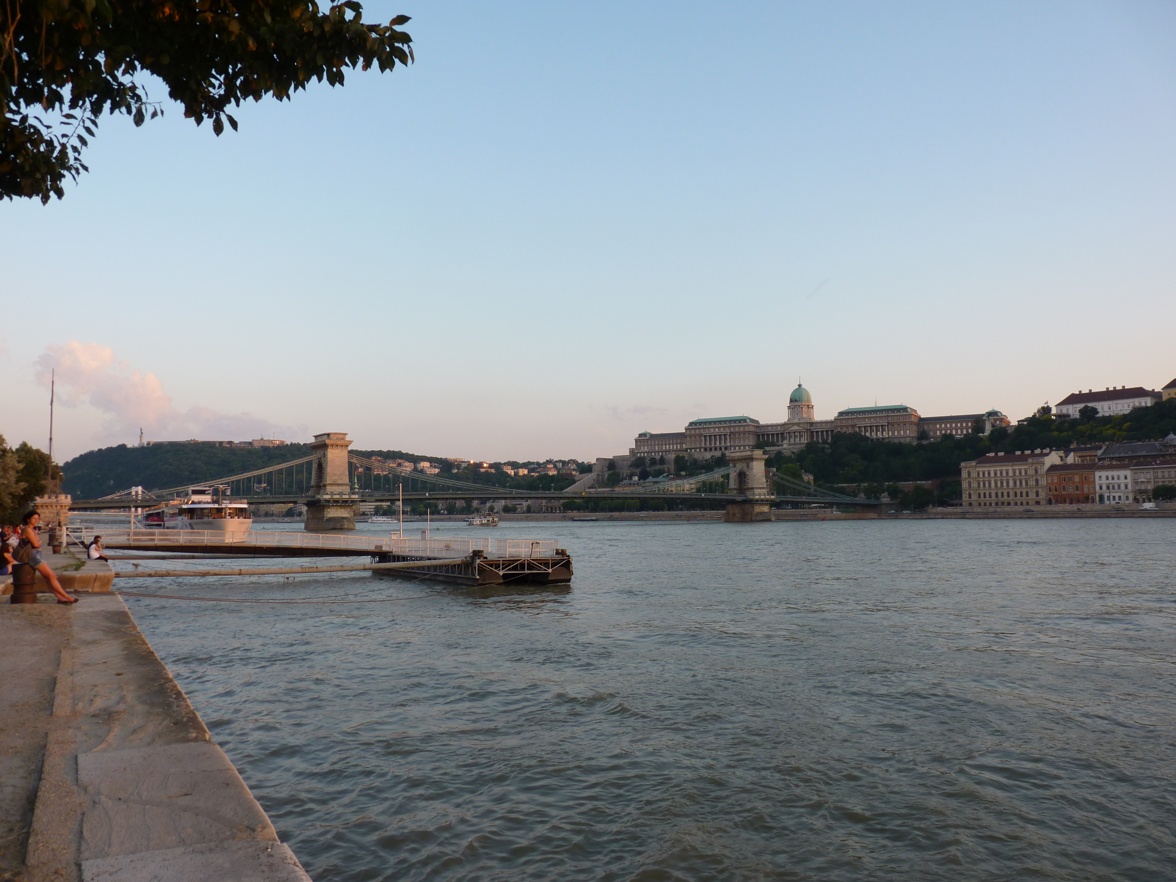 Duna folyam, rakpartok egy részben műemléki védettségű része. A képen a kis bástyaféleség az. - Idősebb Antall József rakpart, Budapest V.